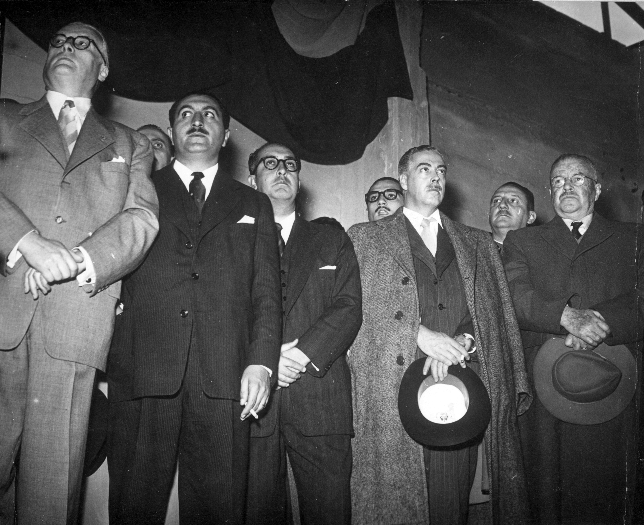 El Presidente Ibáñez del Campo y el ministro de Agricultura Alejandro Hales Jamarne durante la ceremonia de inauguración de la primera planta azucarera nacional de la compañía Industria Azucarera Nacional (IANSA) ubicada en la ciudad de Los Ángeles. También participan de la ceremonia Karl Von Campe, Julio Ruiz B. y David Montané. 1953